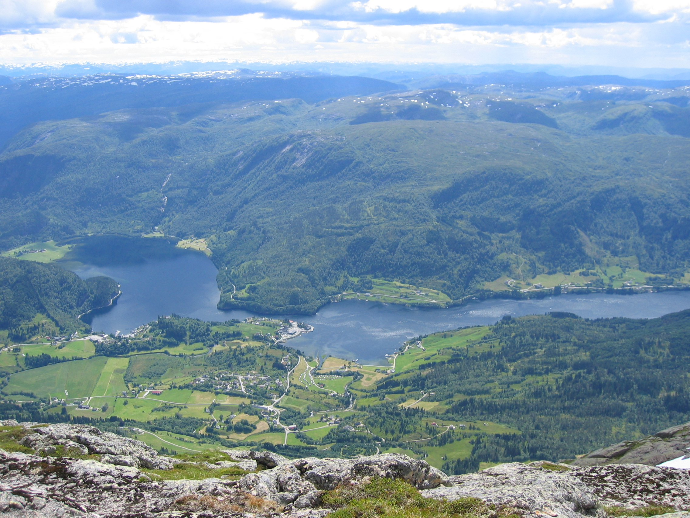 Bygstad sett frå Storehesten